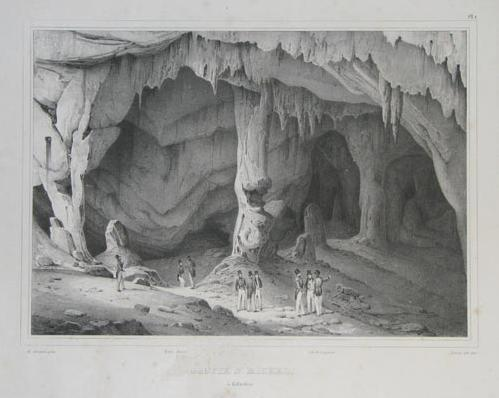 Grotte St. Michel. de Sainson pinx. Arnout lith. 1830